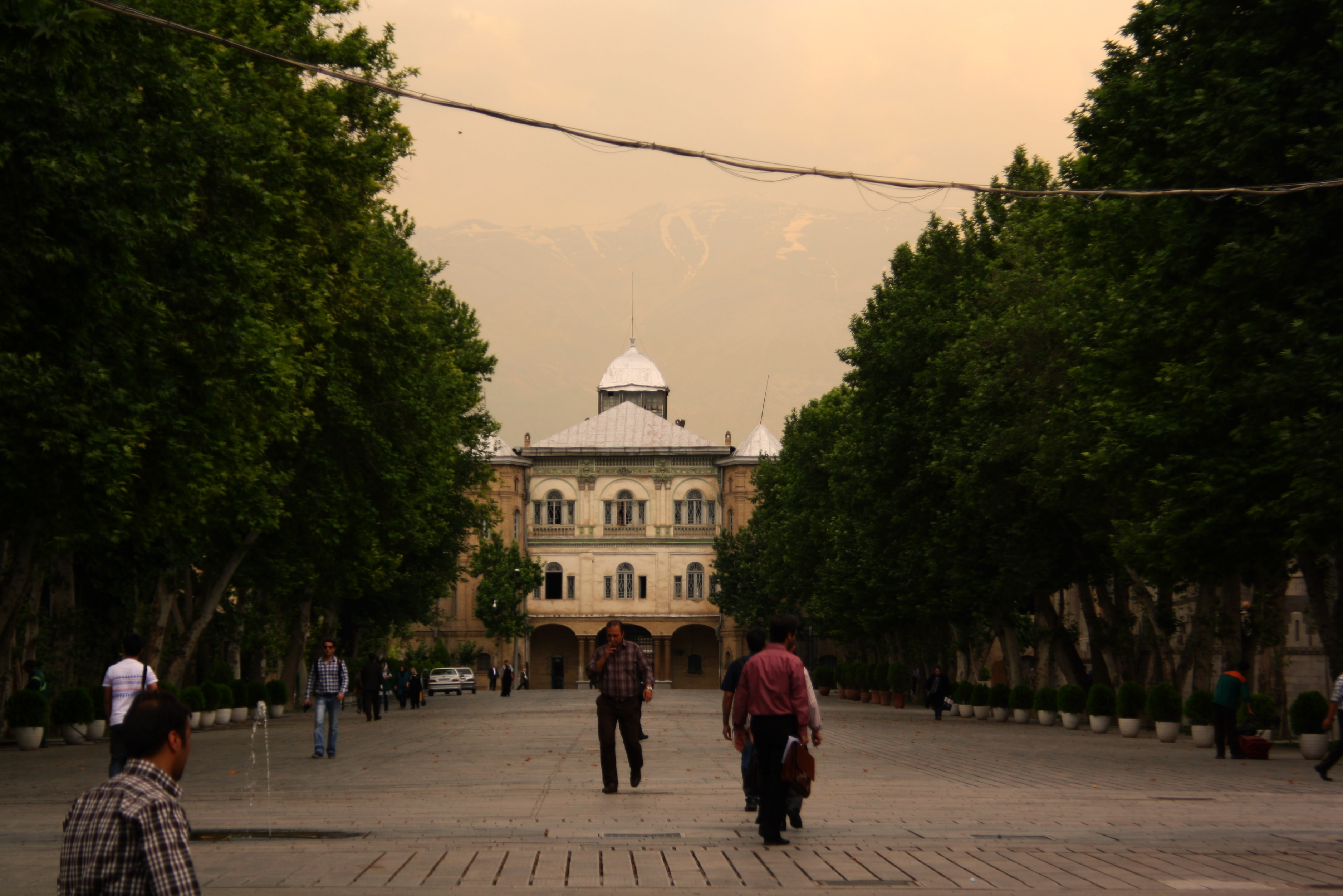 Tehran National Garden, Tehran, Iran